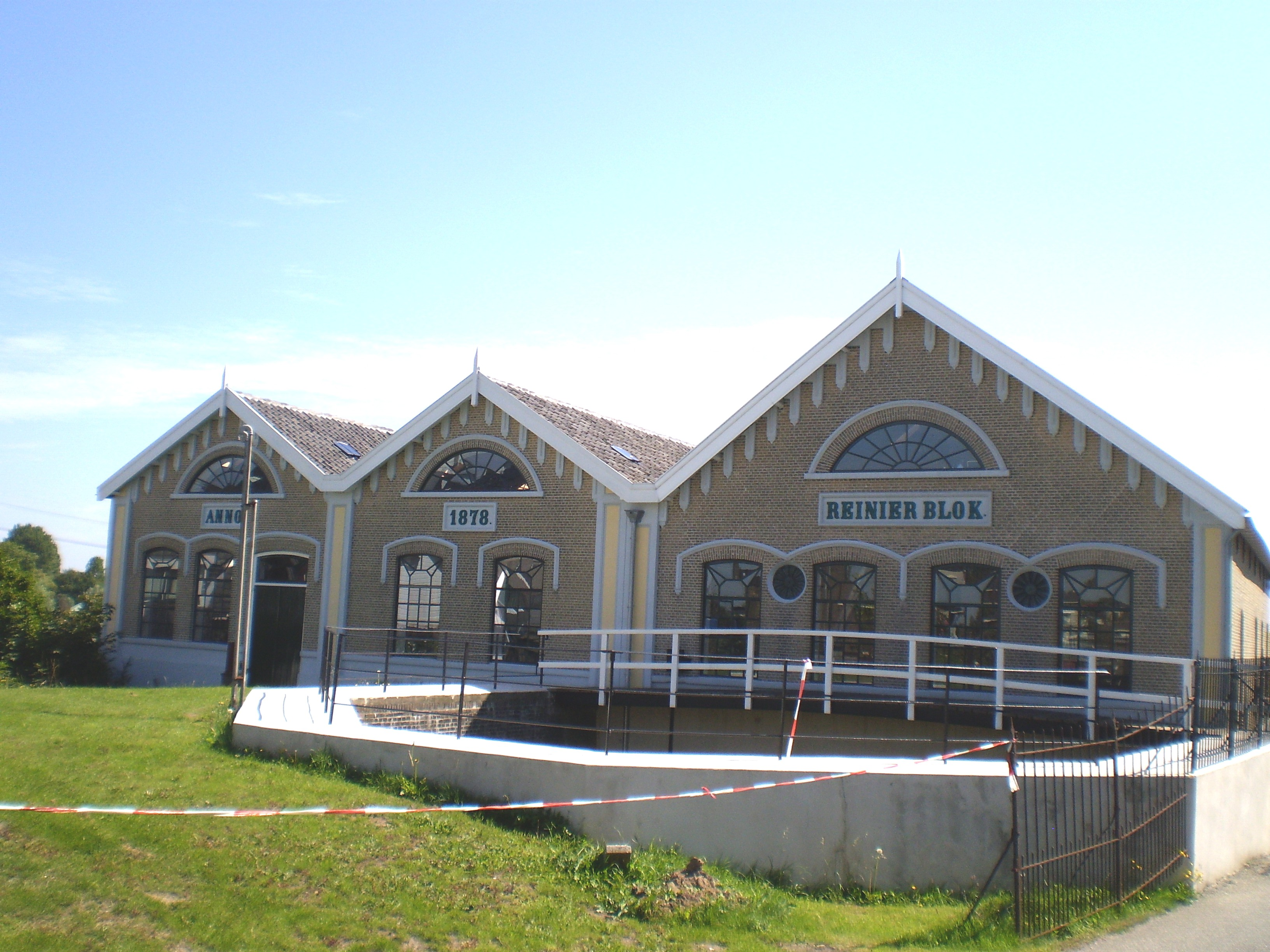 == Lisinsje: ==